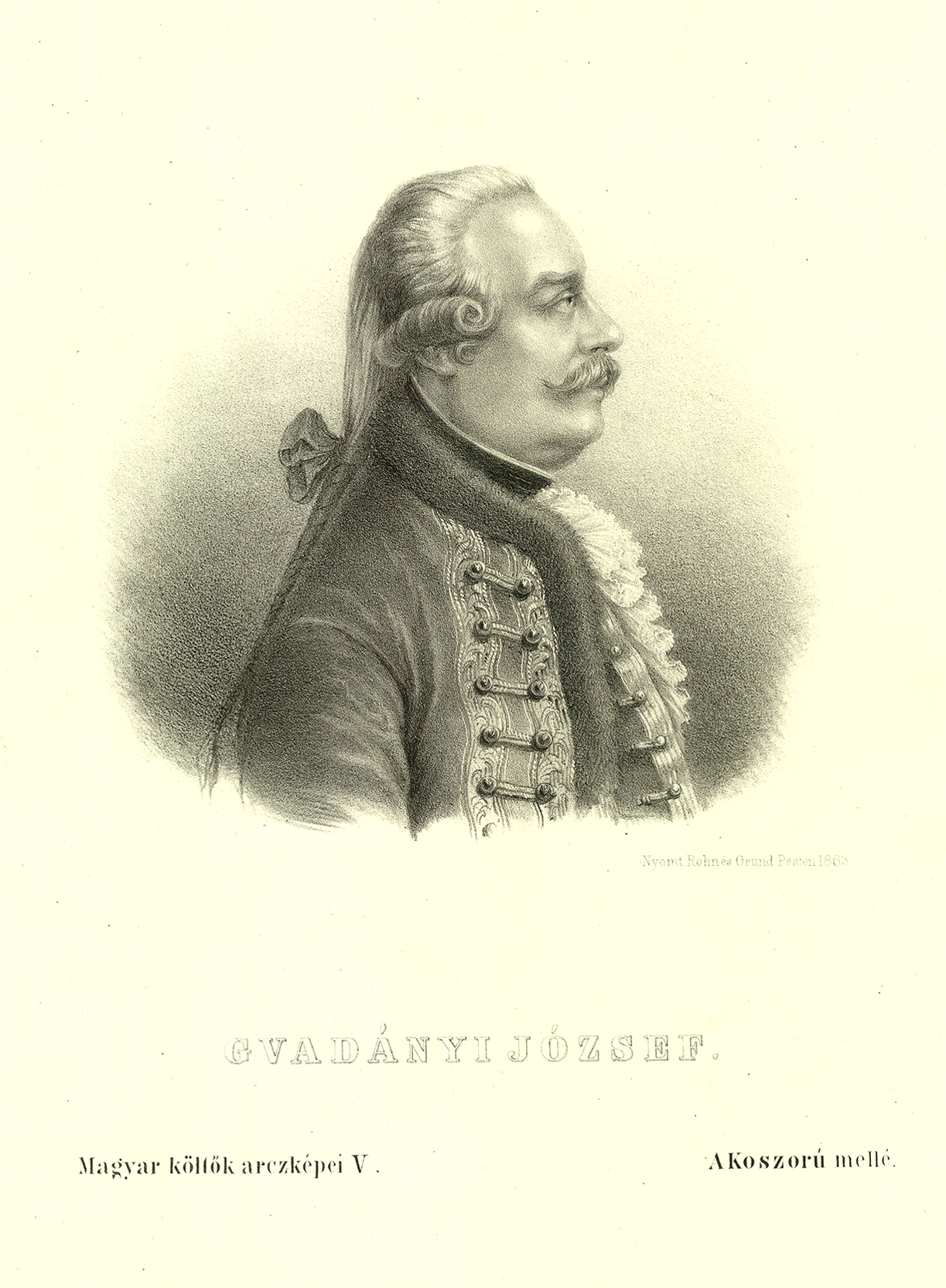 Arezzói (őr)gróf Gvadányi József, (Rudabánya, 1725. október 16. – Szakolca, 1801. december 21.) generális, író.